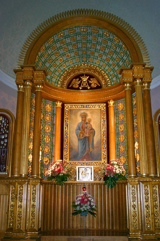 Szczyrk (Polska)